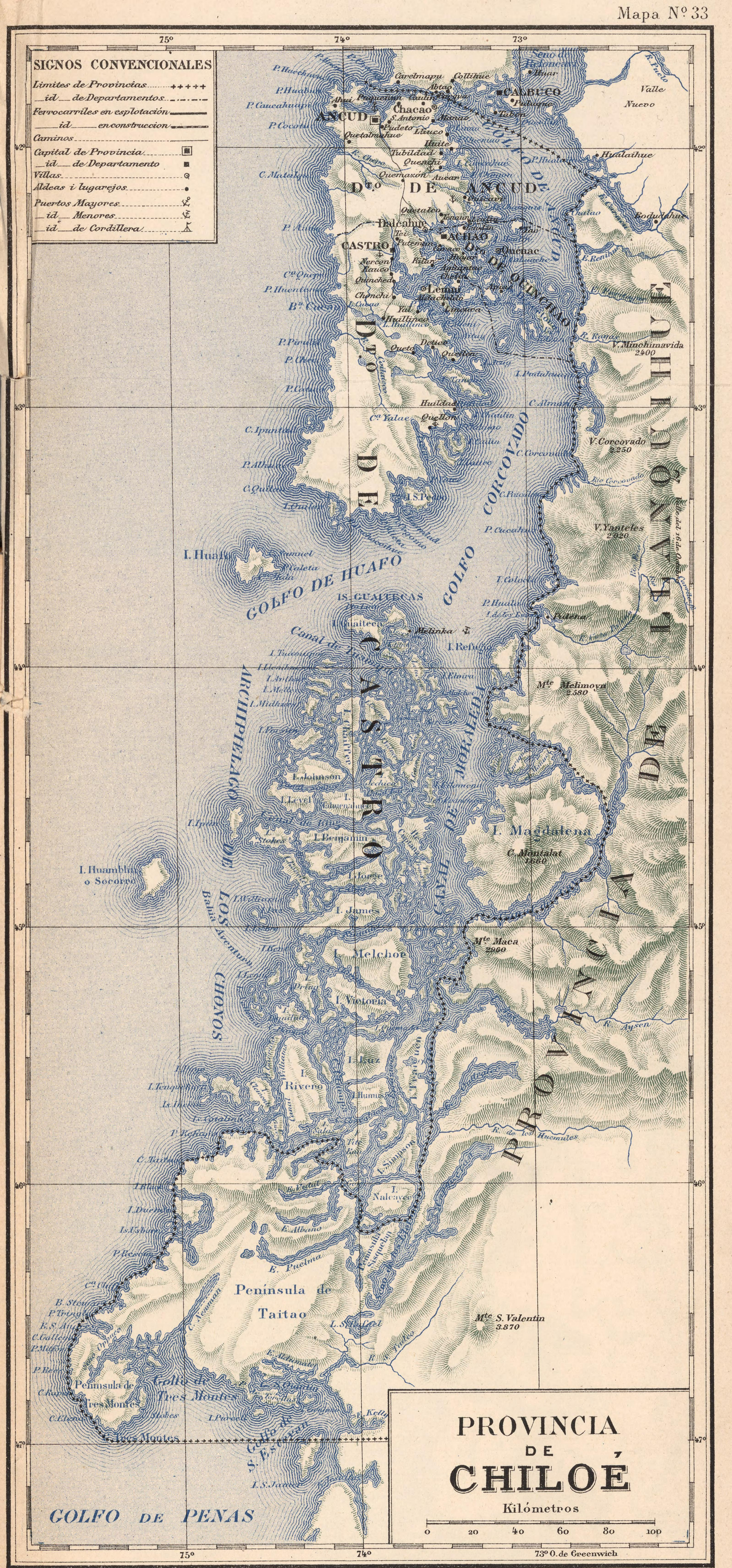 Atlas de Chile Arreglado para la Jeografia Descriptiva de la Republica de Chile por Enrique Espinoza.